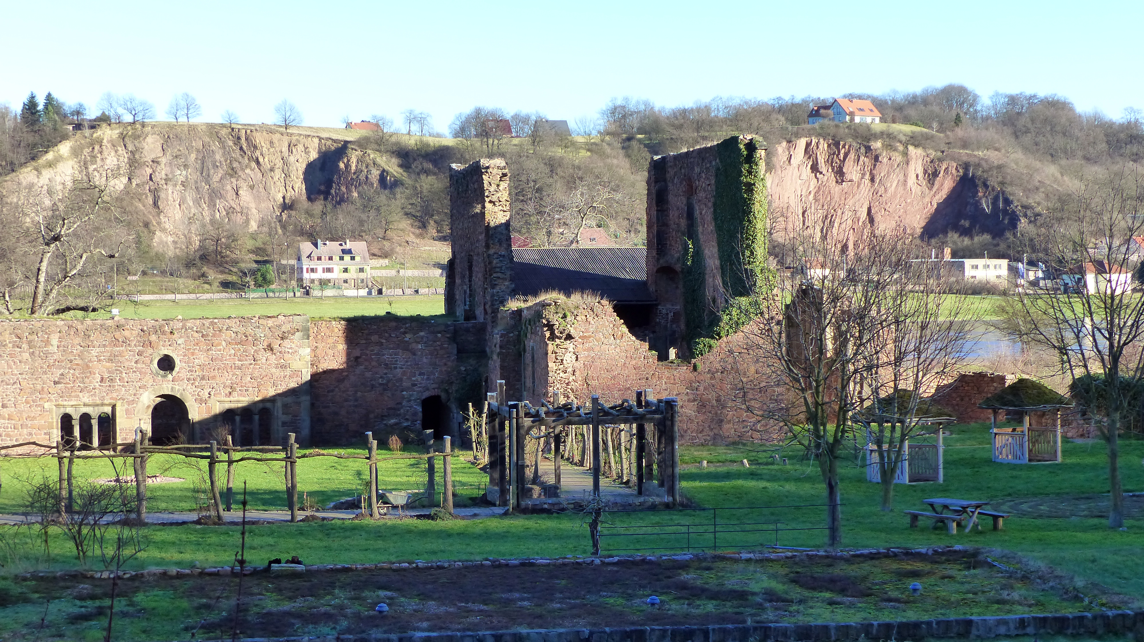 Ruine: Kloster zum Heiligen Kreuz, Meißen